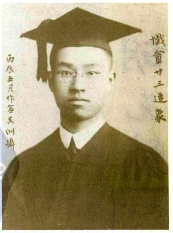 胡先驌院士1916年在美國加州伯克萊大學獲得植物學碩士